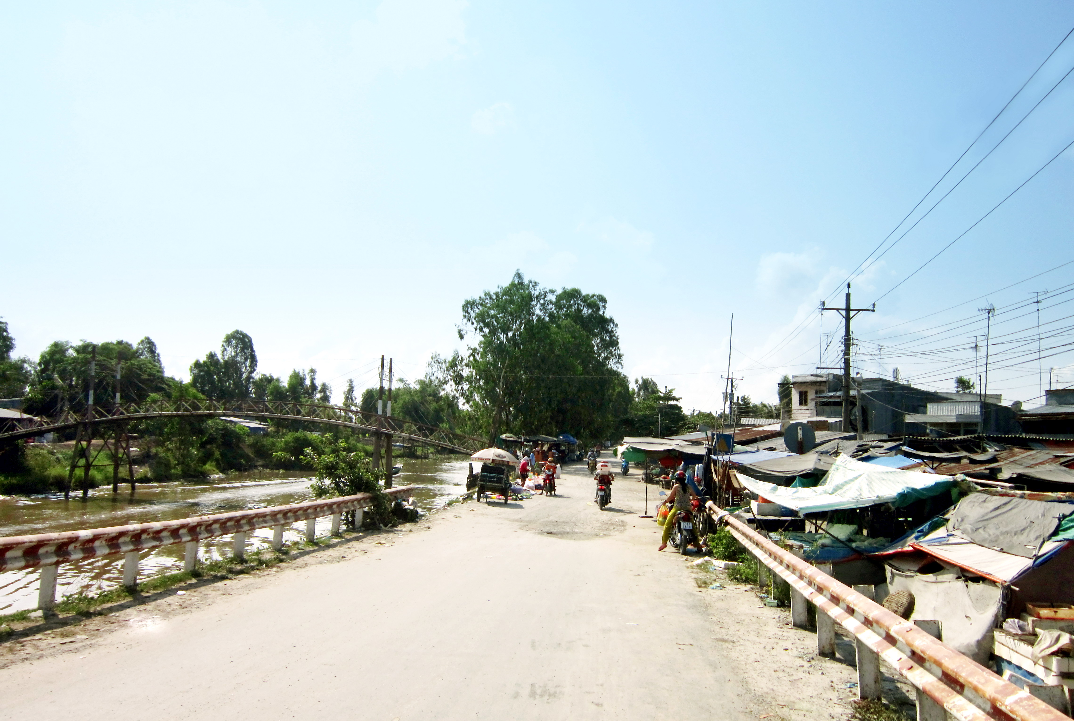 Trên tỉnh lộ 943, đoạn đi qua chợ Tân Tuyến (phải ảnh), thuộc xã Tân Tuyến, huyện Tri Tôn, An Giang, Việt Nam.